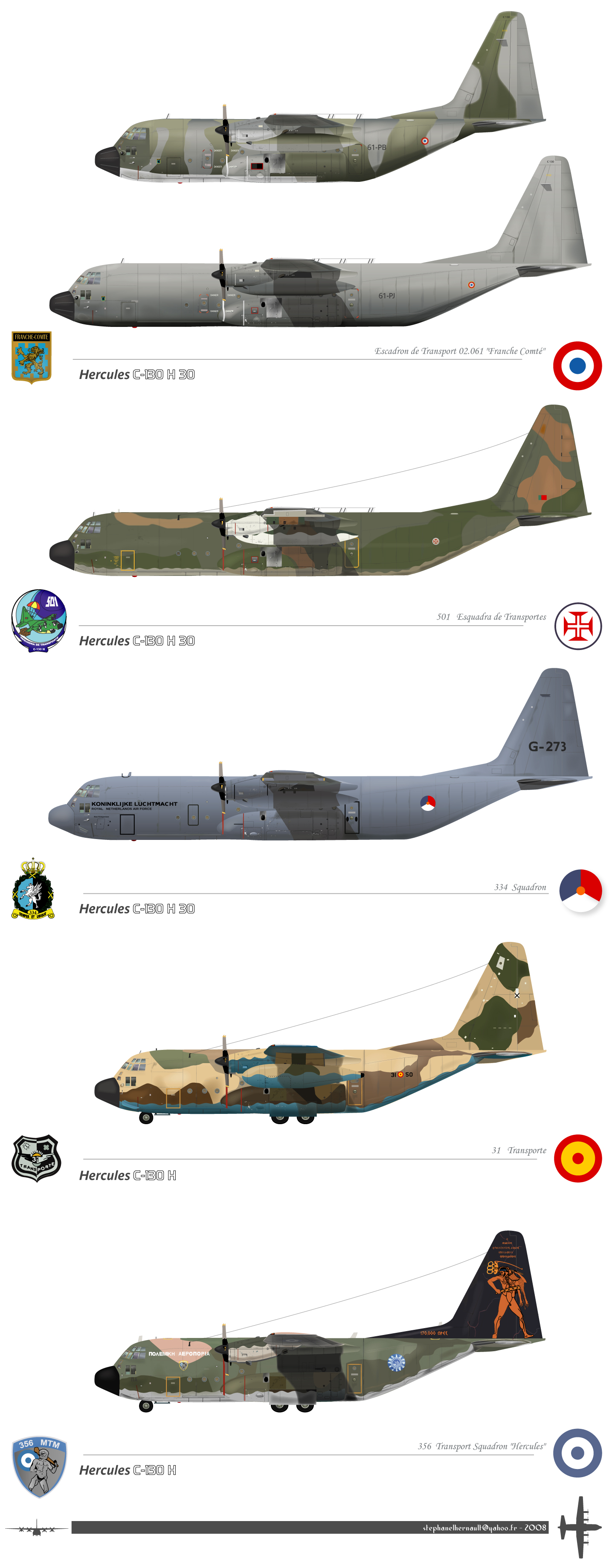 C 130 Européen France/Portugal/Pays Bas/ Espagne / Grece